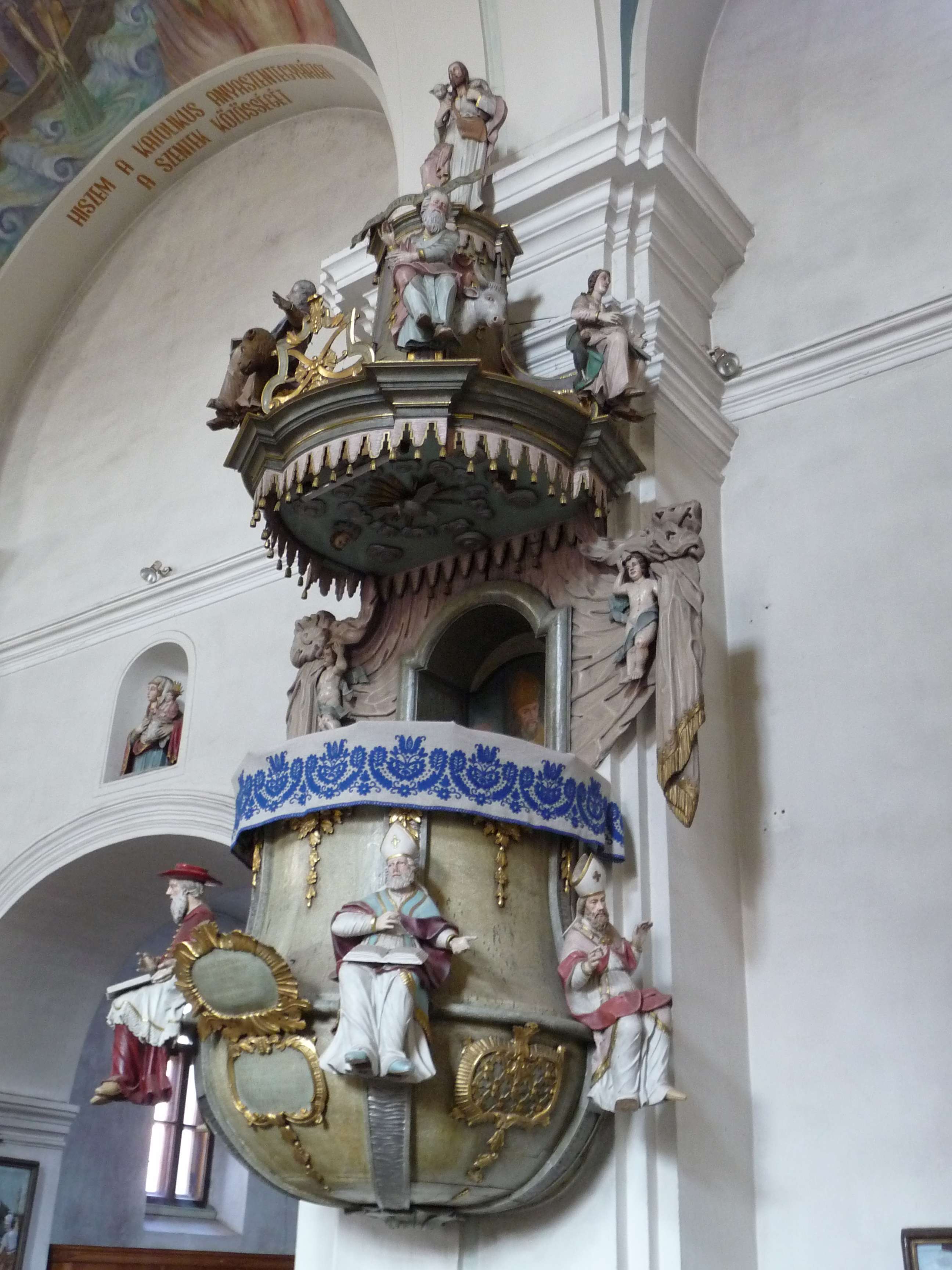 Gyergyószentmiklós, a római katolikus templom szószéke